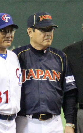 Koji Yamamoto